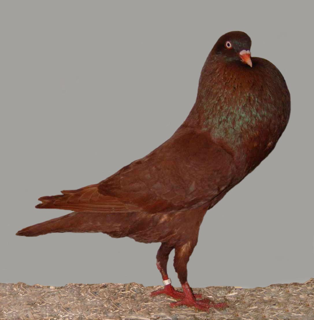 Steiger Cropper (Red Self)